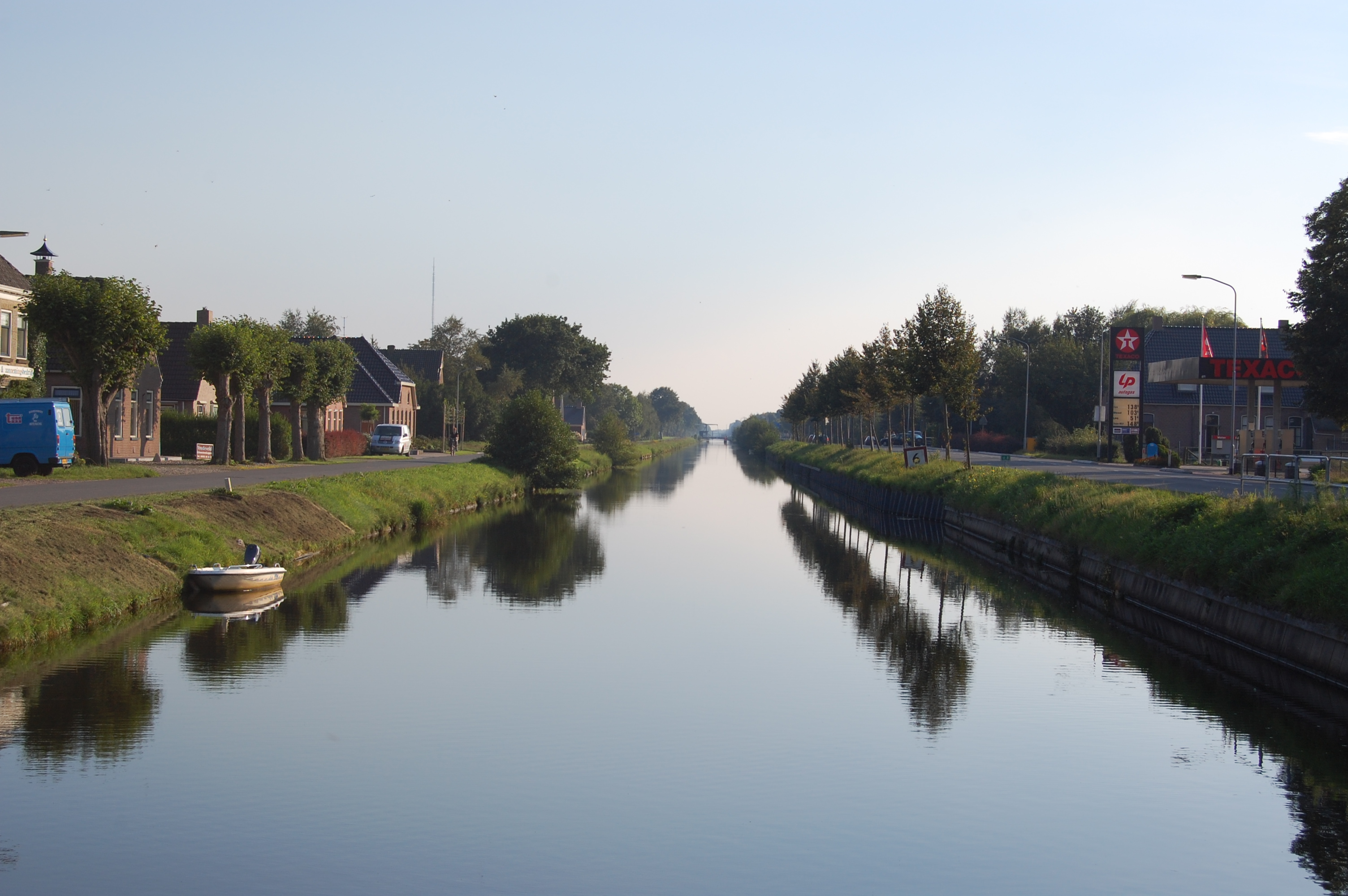 Drentse-Hoofdvaart te Smilde in zuidelijke richting.